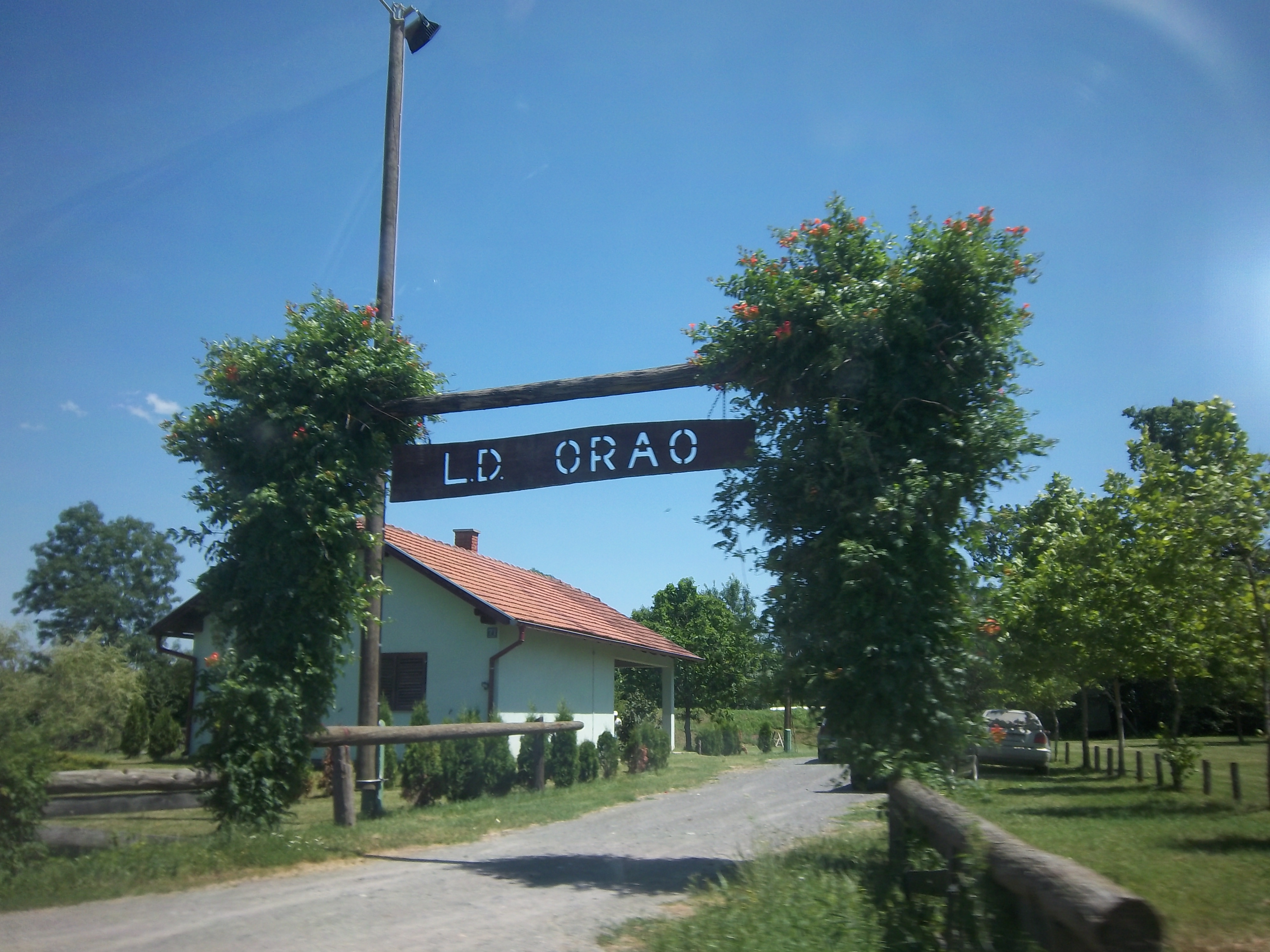 Lovački dom u Novim Jankovcima Srpskohrvatski / српскохрватски: Lovački dom u Novim Jankovcima